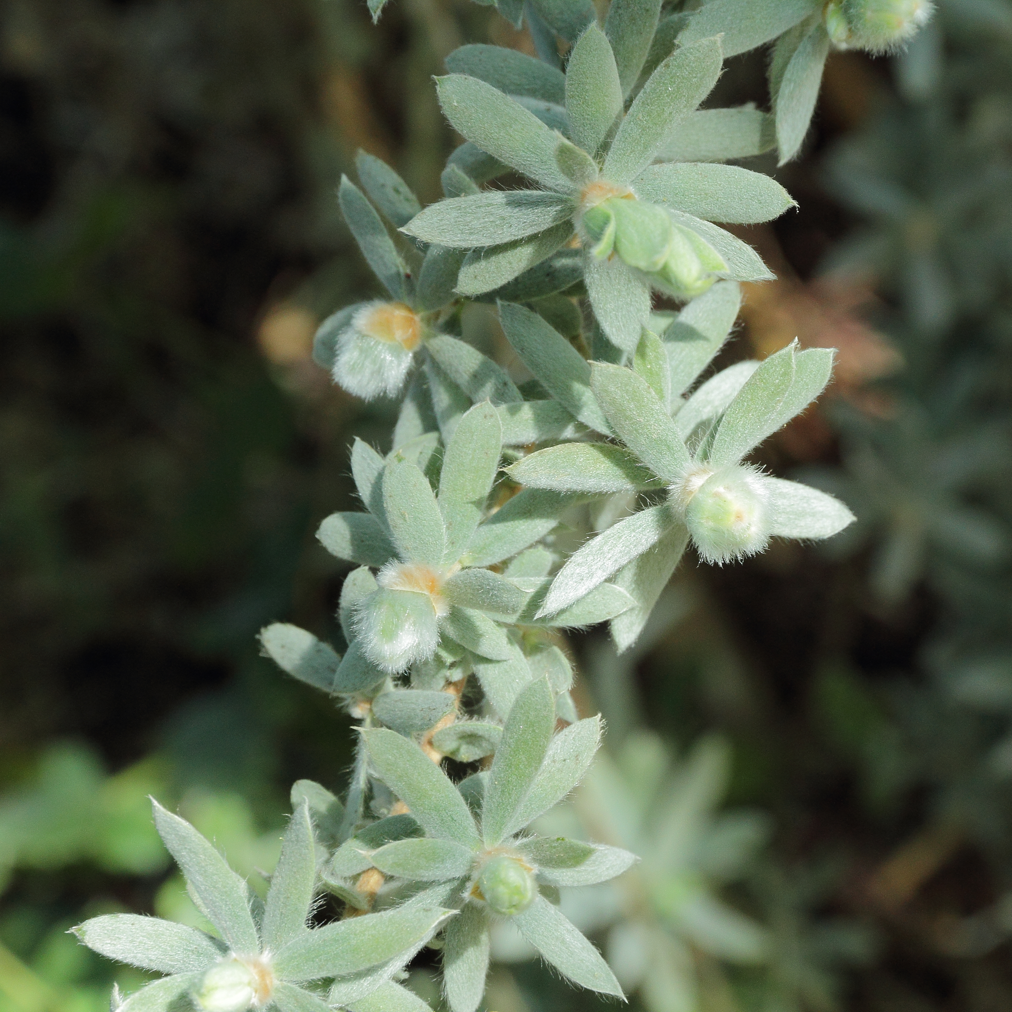 Leptospermum lanigerum i Bergianska trädgården.